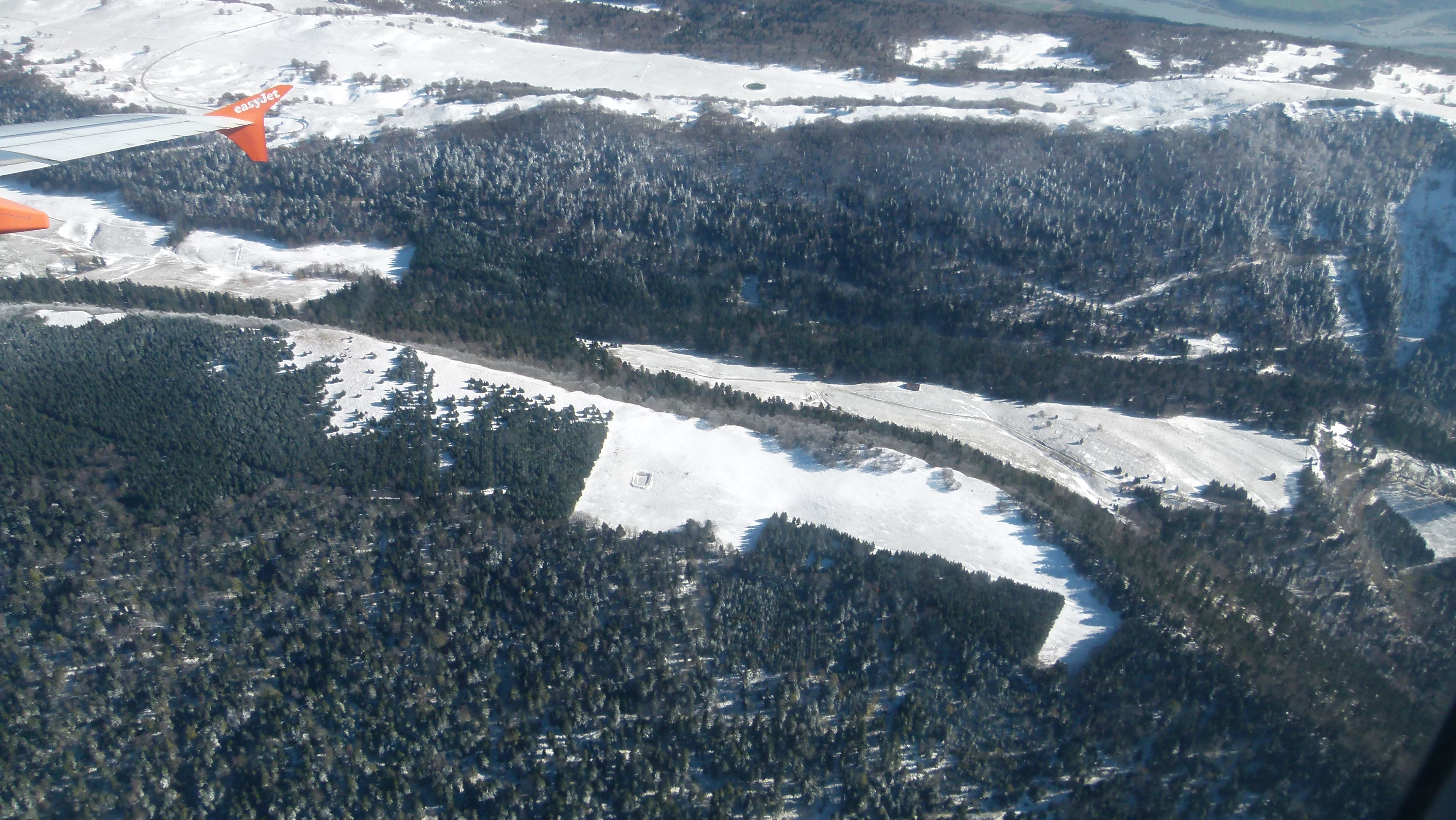 Blick vom Flugzeug auf den L'Hergues (1426 m), einer Jurakrete, die zum Höhenzug des Grand Colombier gehört und sich nordwärts zum Crêt du Nu hinzieht, zwischen Brénaz im Westen und Seyssel im Osten gelegen